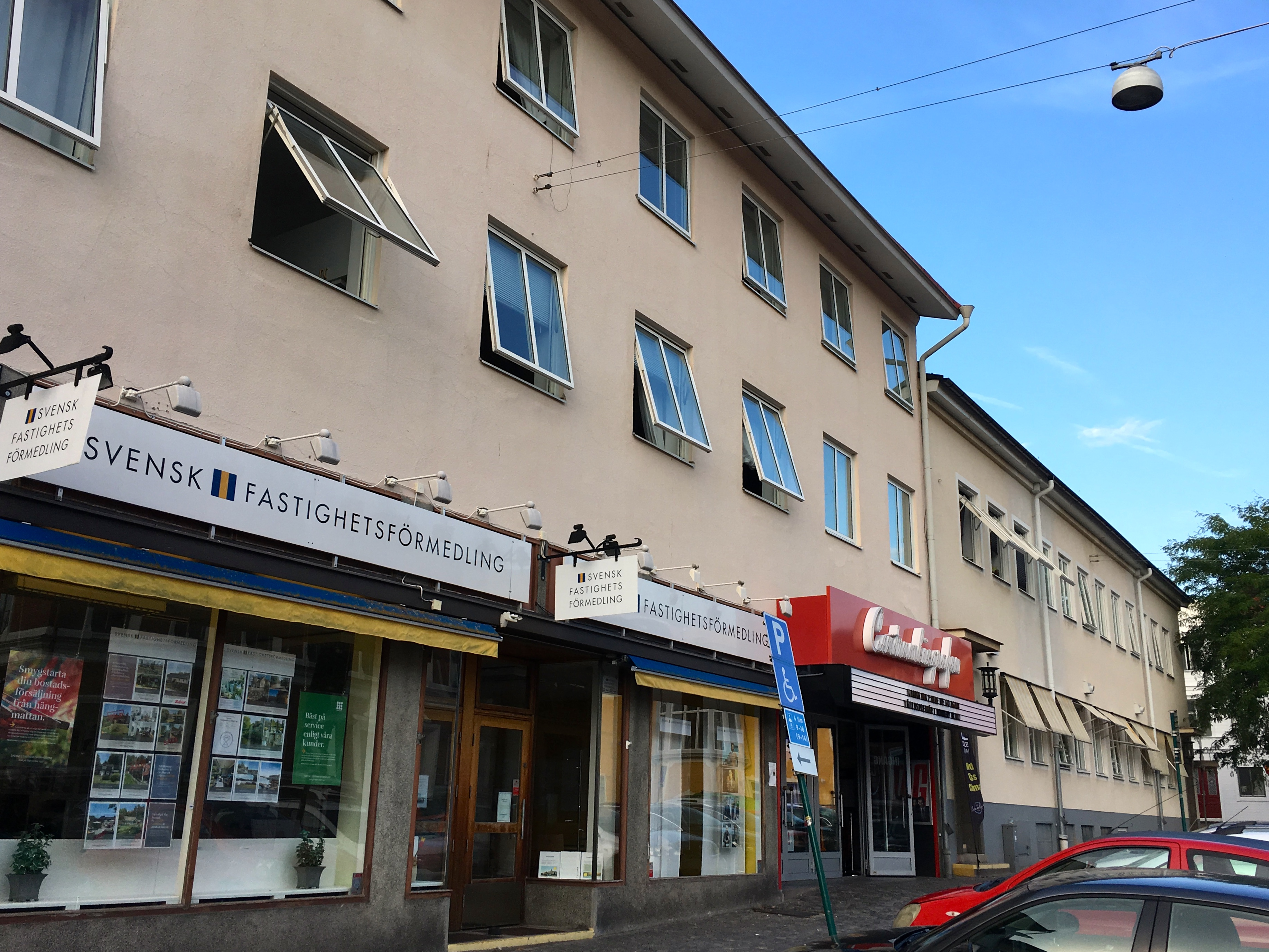 Funkishus med biografen Centrum i Ronneby centrum.